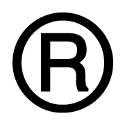 Gemaakt met The GIMP. Bestandsformaat: 180x180 PNG, eerst door pngrewrite en dan door pngcrush gehaald om een zo klein mogelijk bestand te krijgen (zonder enige kwaliteitsverlies). Font: (190pt) NimbusSanL-Regu 1.05 CreationDate: Wed Dec 22 1999 Copyright (URW)++,Copyright 1999 by (URW)++ Design & Development (URW)++,Copyright 1999 by (URW)++ Design & Development See the file COPYING (GNU General Public License) for license conditions. As a special exception, permission is granted to include this font program in a Postscript or PDF file that consists of a document that contains text to be displayed or printed using this font, regardless of the conditions or license applying to the document itself.